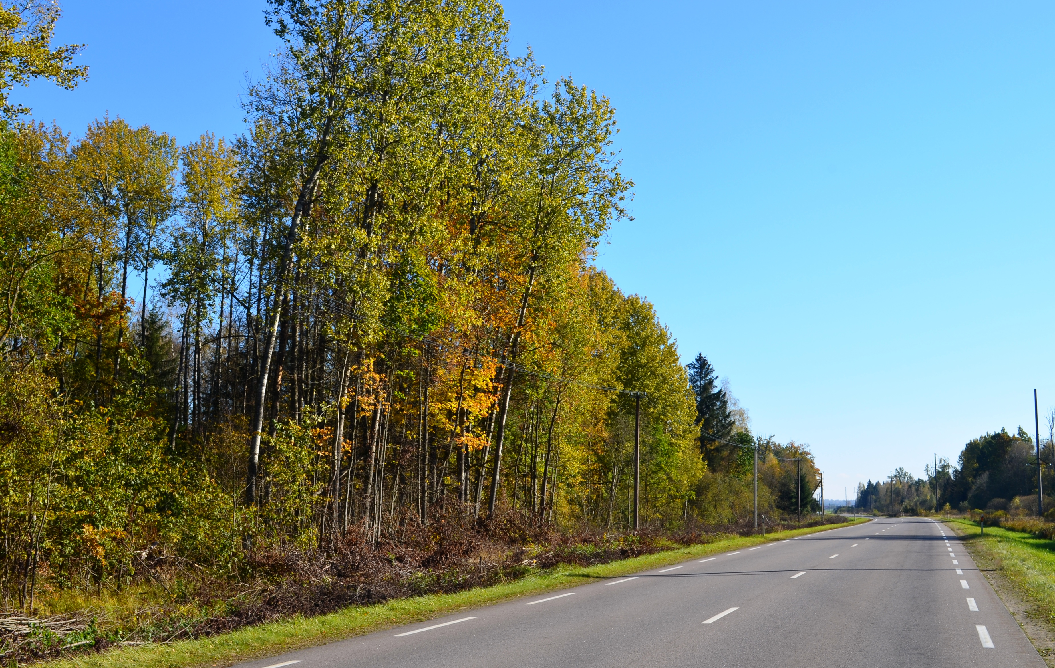 Pasraučių miškas ir kelias KK145, Jonavos raj.